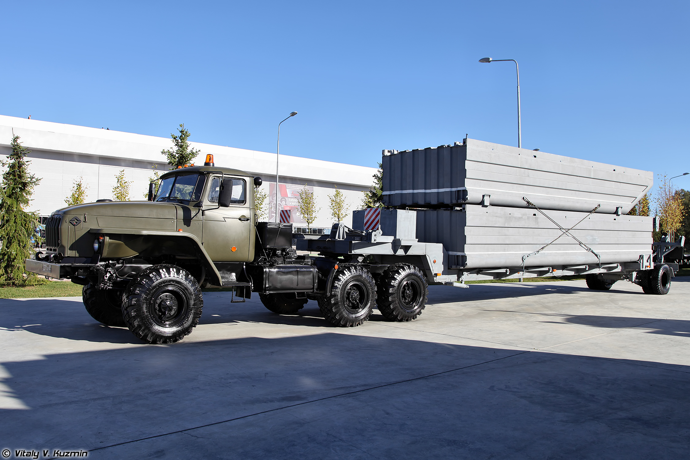 Автопоезд специальный АПС-1 с секциями понтонов наплавного железнодорожного моста НЖМ-56 (APS-1 carrier with NZhM-56 railroad pontoon bridge sections)